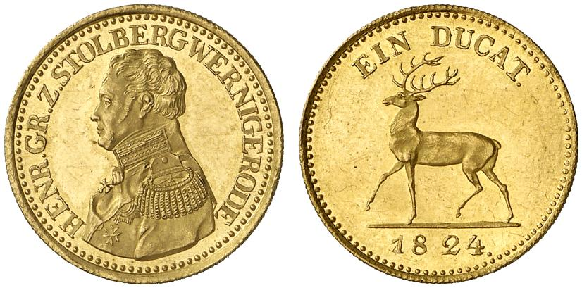 Münze Gold: Ein Dukat, Henrich zu Stolberg-Wernigerode, 1824